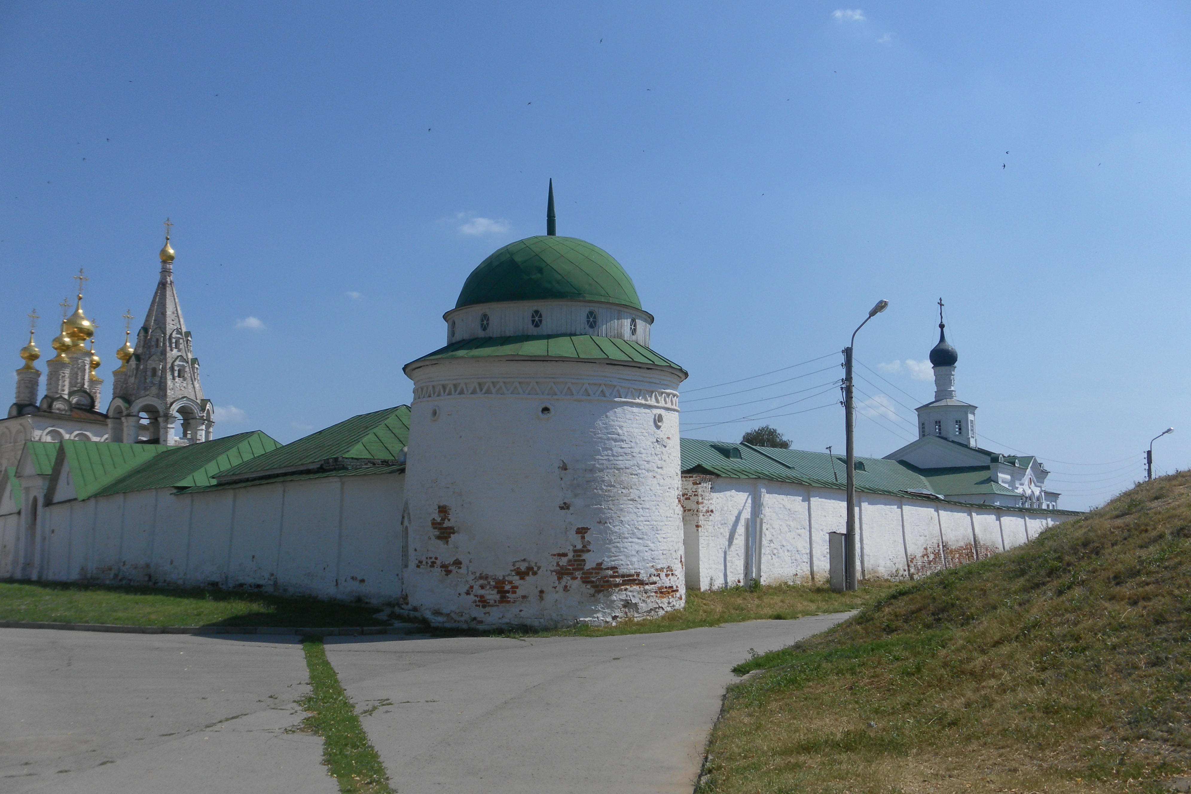 Рязань Кремль